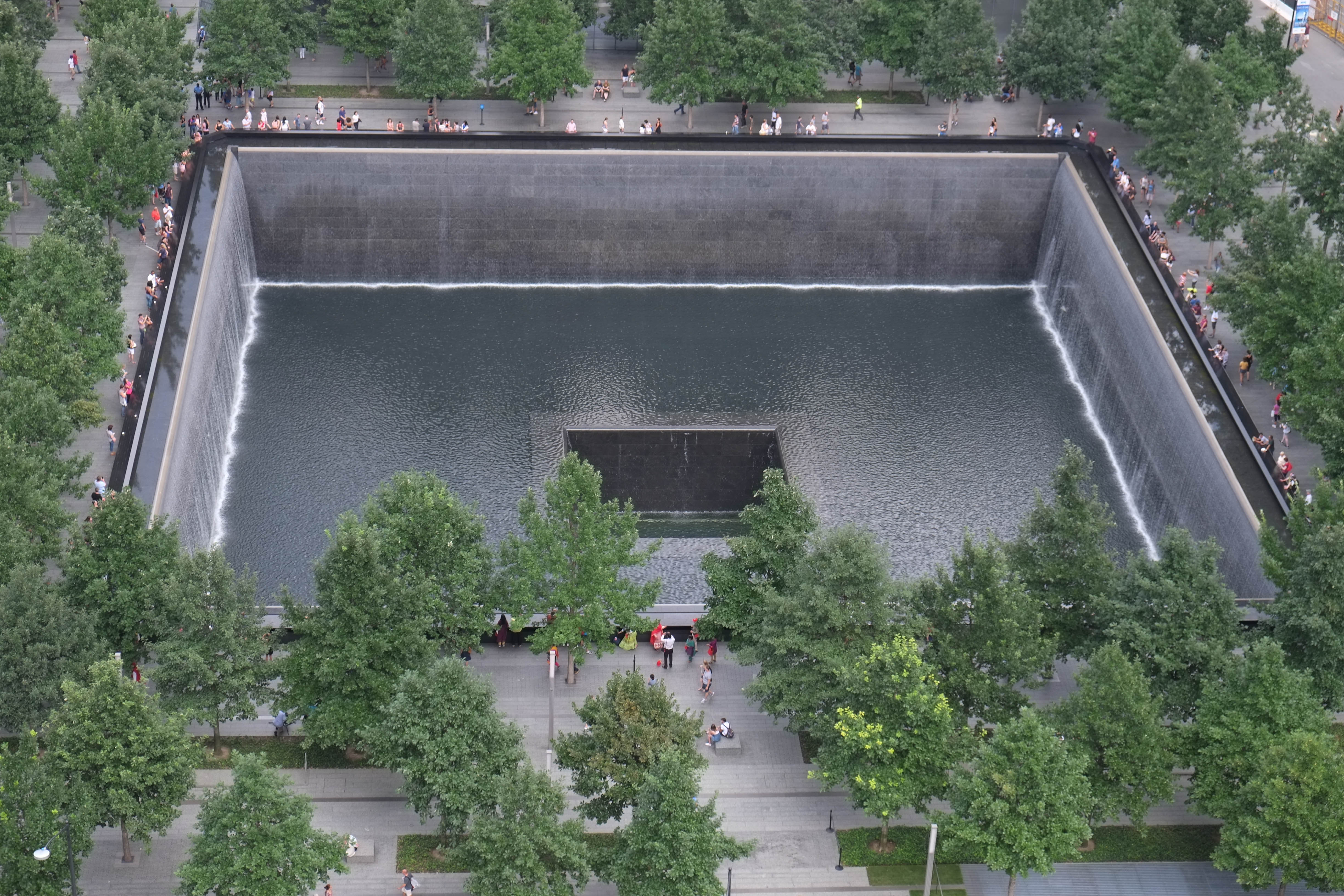 9/11 Memorial